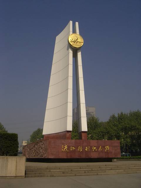 渡江勝利紀念碑 2004年4月15日撮影 撮影者:権作 参照：